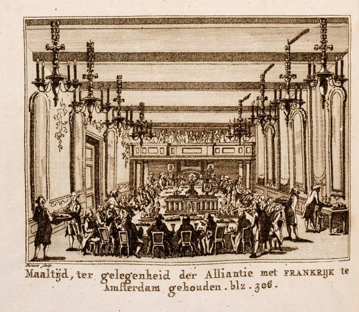 Maaltijd, ter gelegenheid der Alliantie met Frankrijk te Amsterdam gehouden blz 306